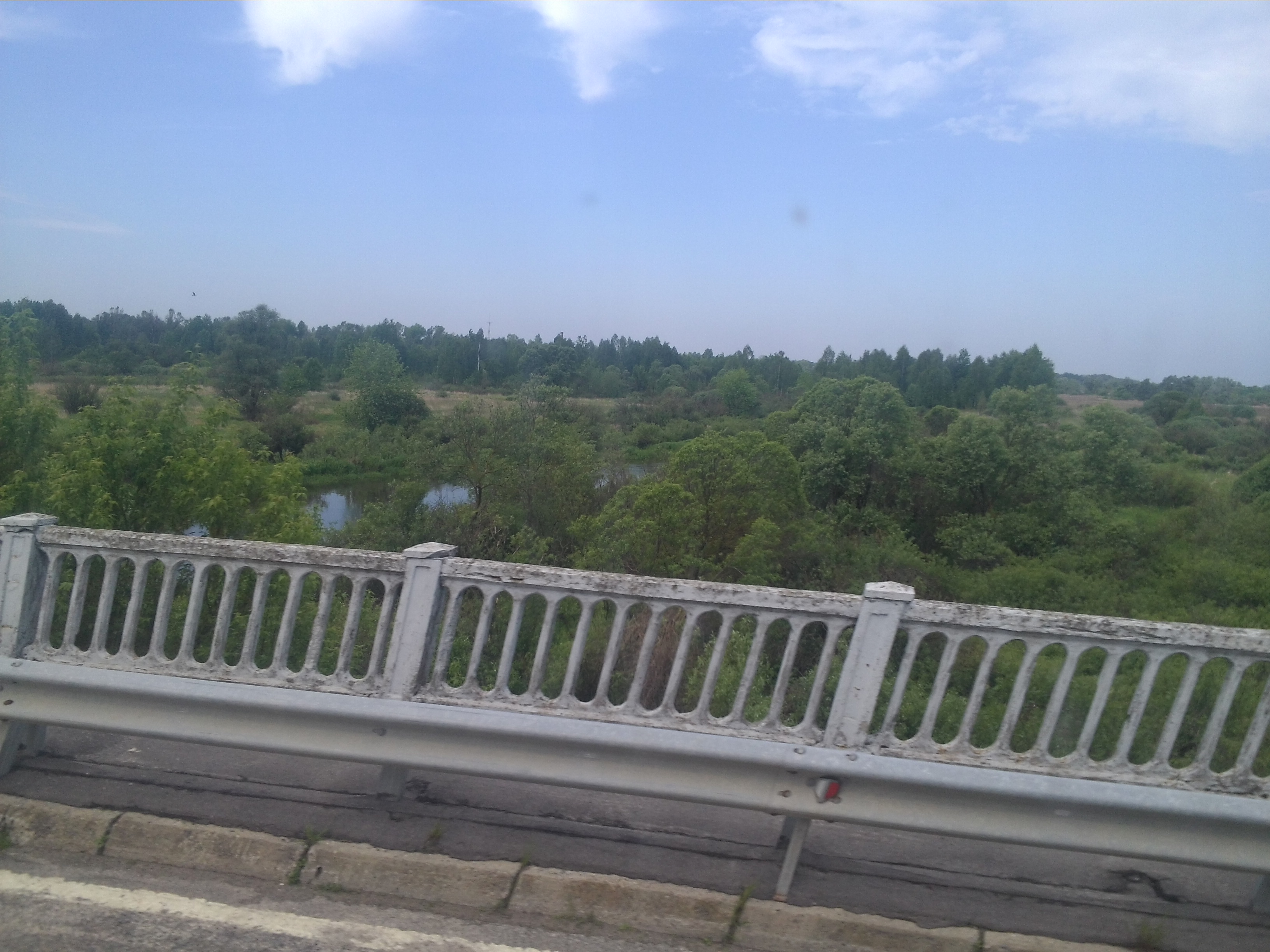 Річка Уж в смт Поліське